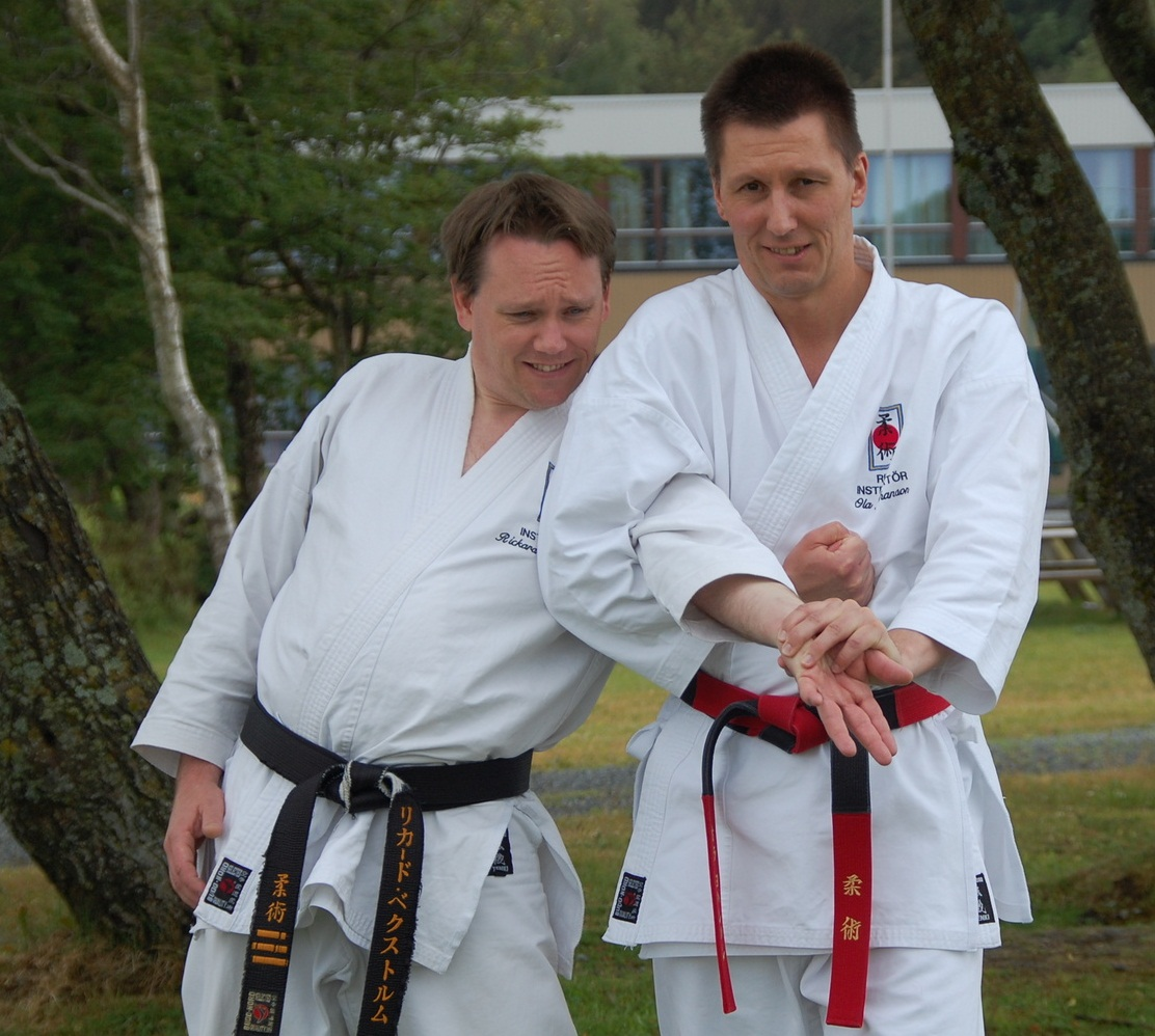 Ju-jutsu Hiji gatame